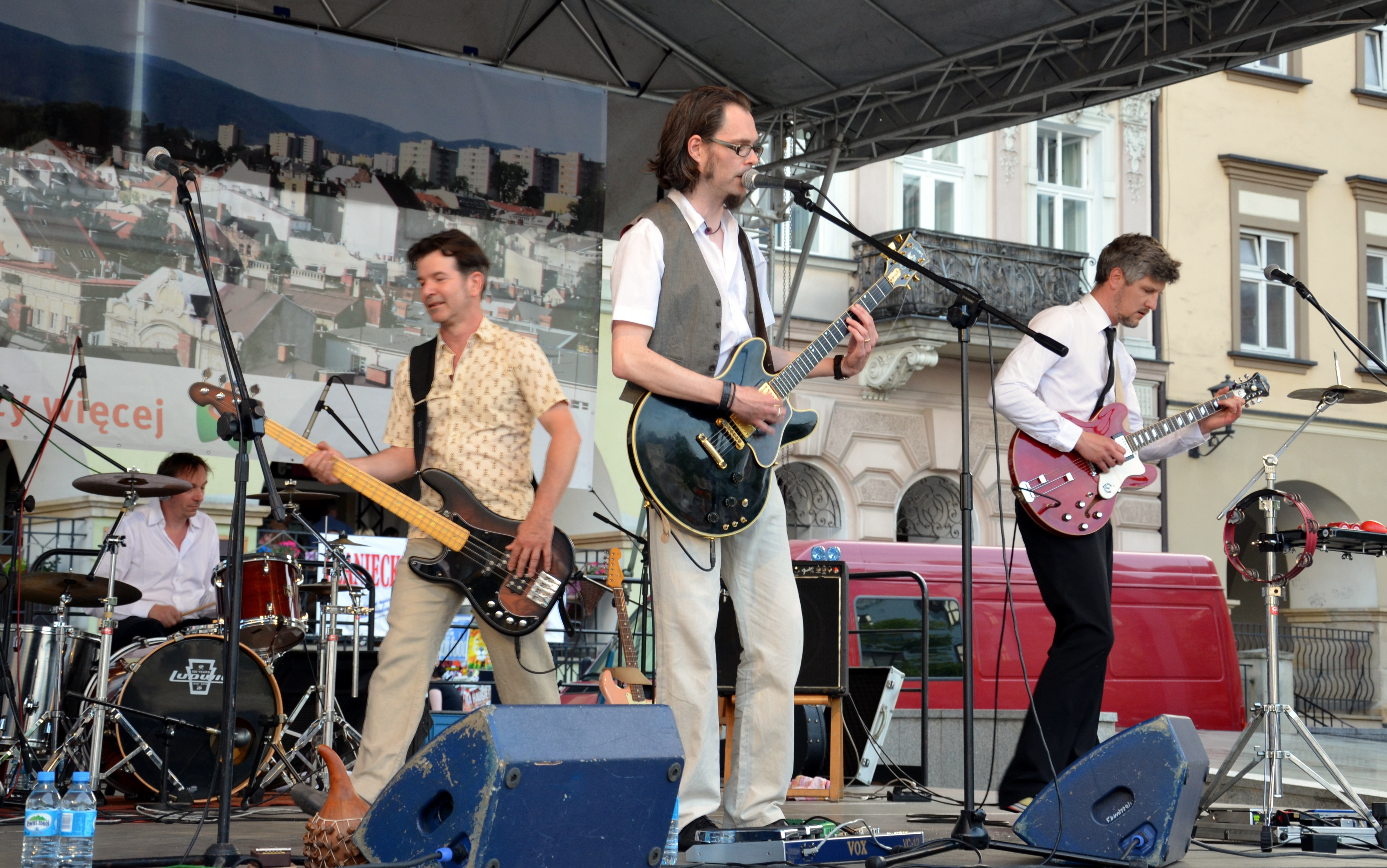 Müller & die Platemeiercombo Konzert – Bielsko-Biala, Wolfsburg